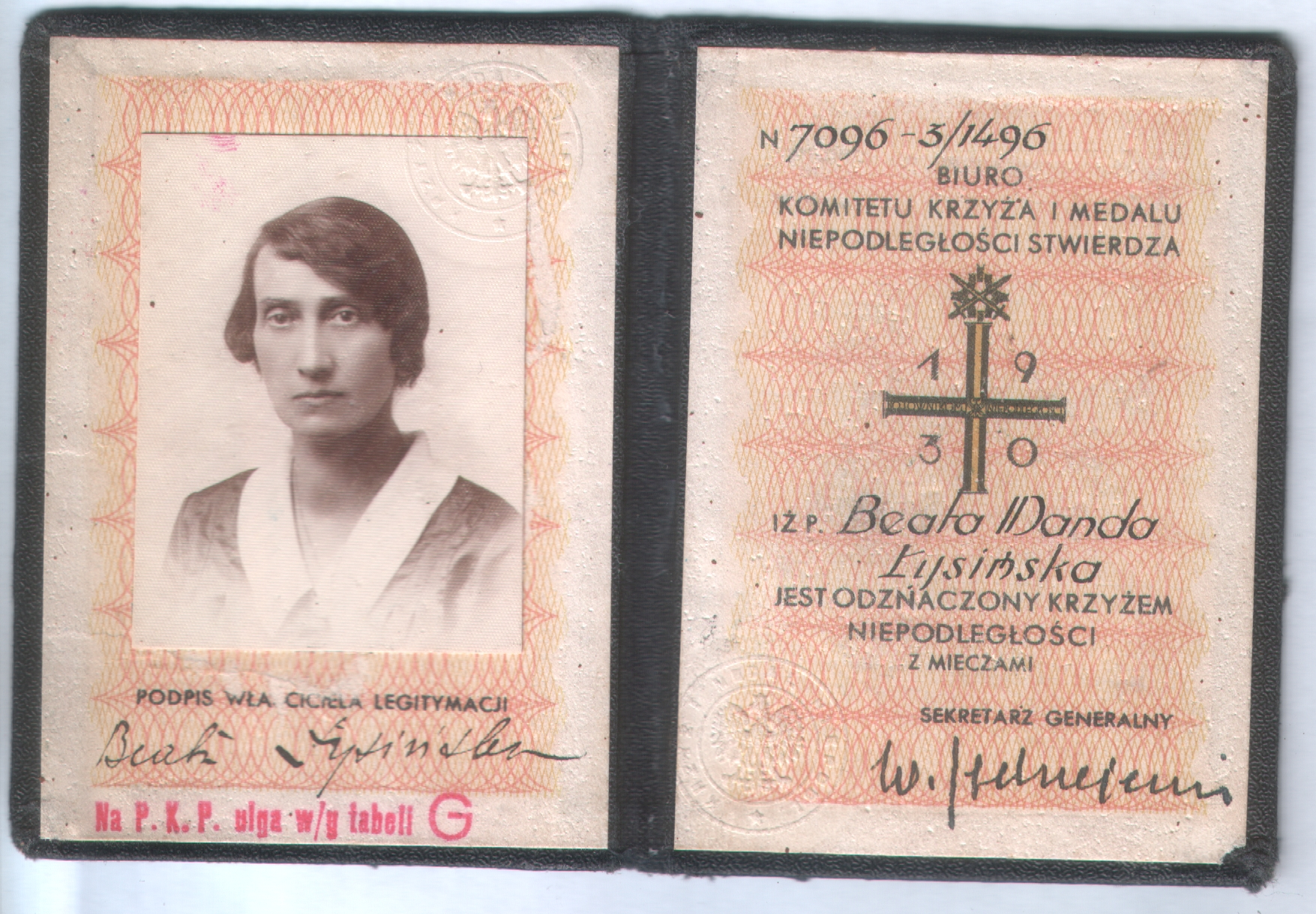 Legitymacja odznaczenia Krzyżem Niepodległości z mieczami dla Beaty Łysińskiej